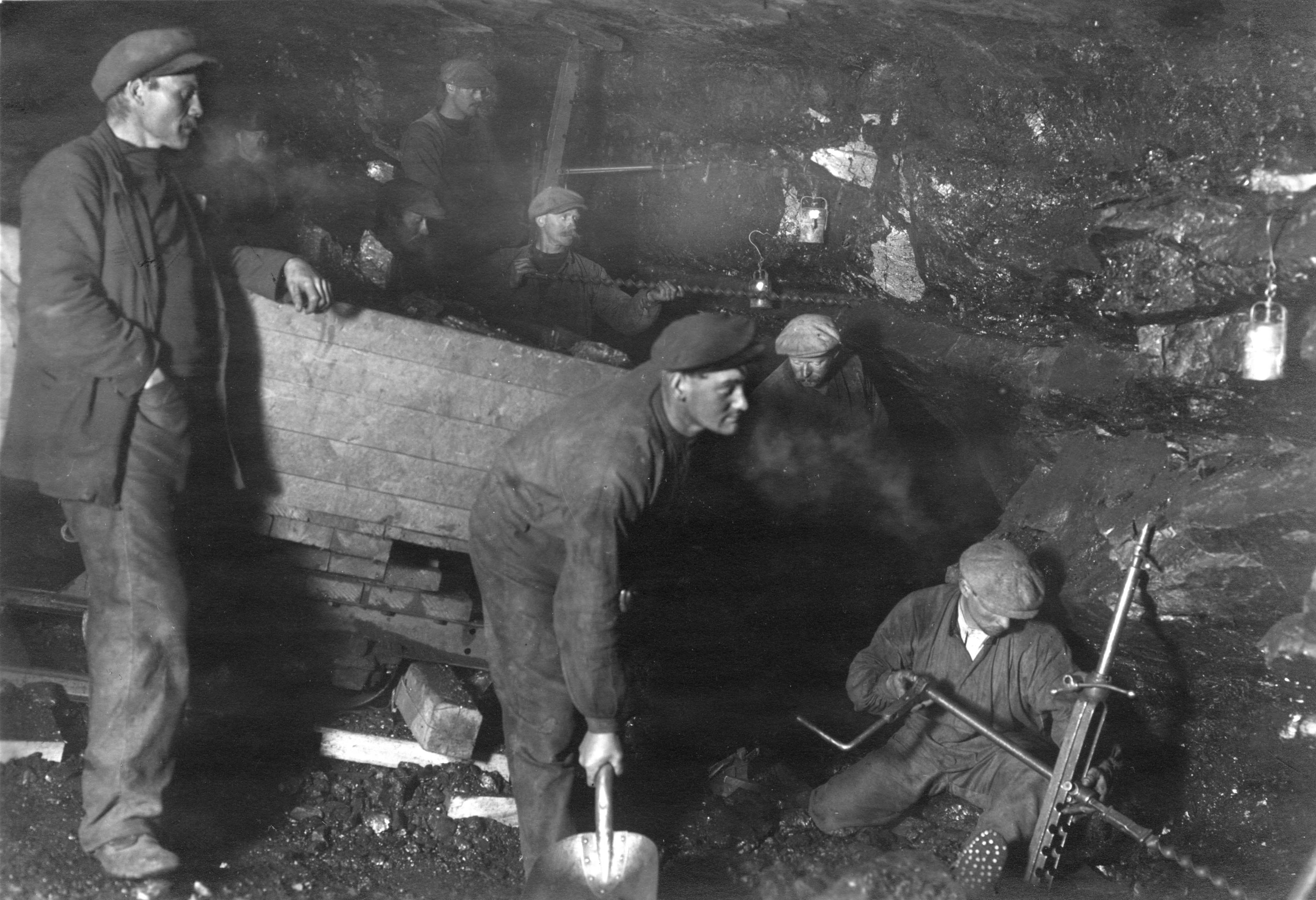 I gruven Agnes. Arkivref.: PA-1632D1_2_8 Foto: Sigvald Moa